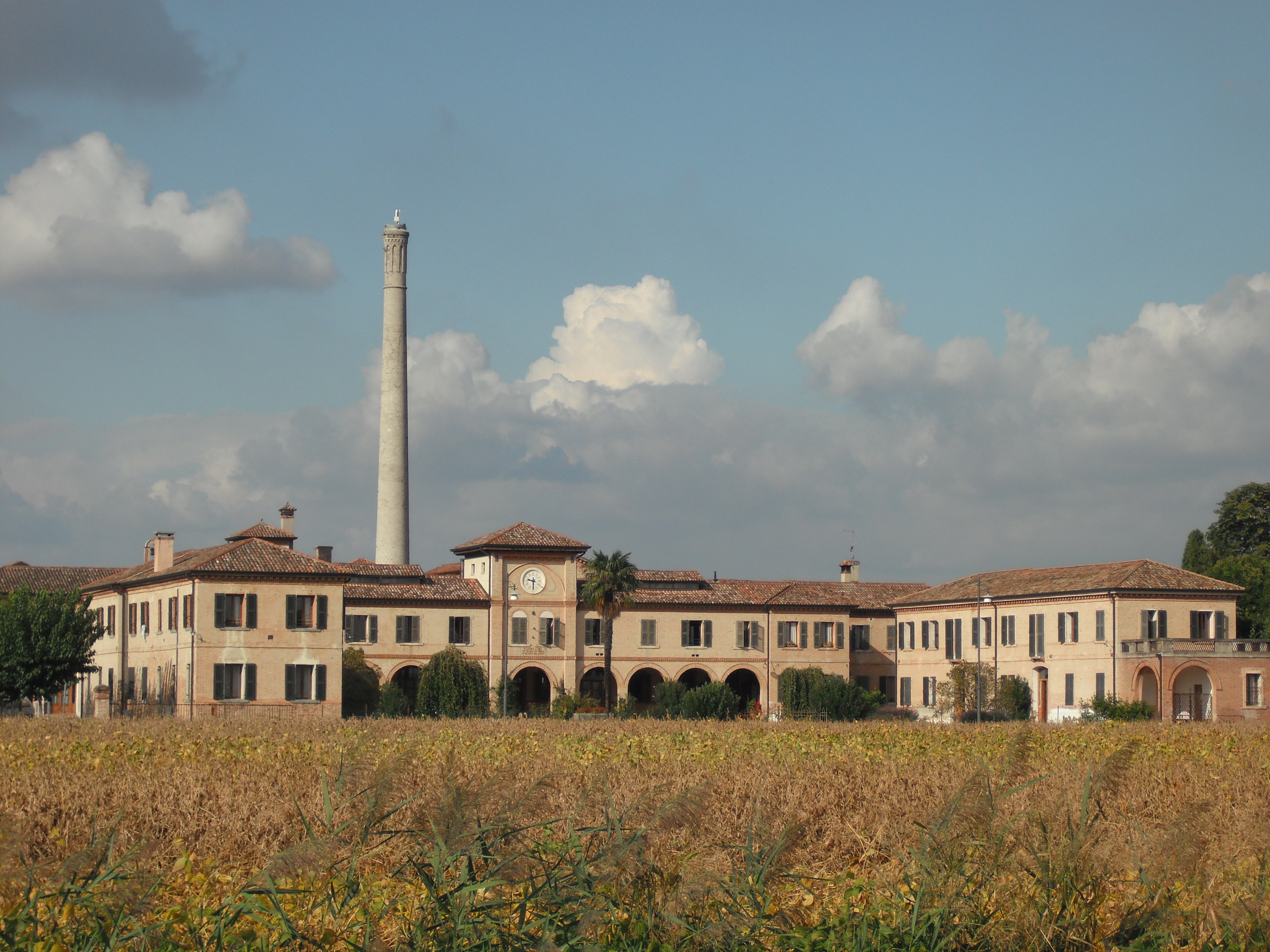 GFDL